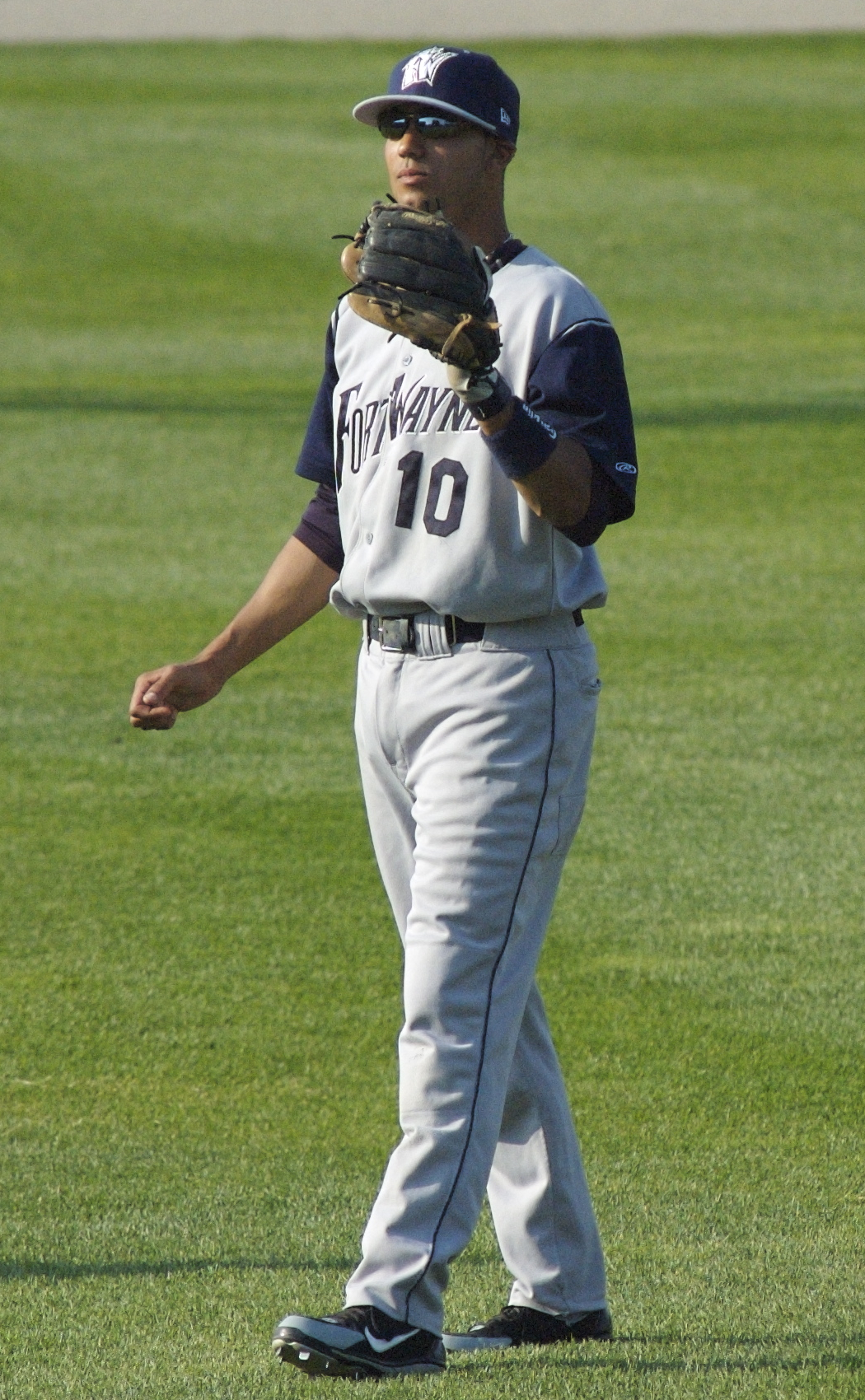 Matt Bush